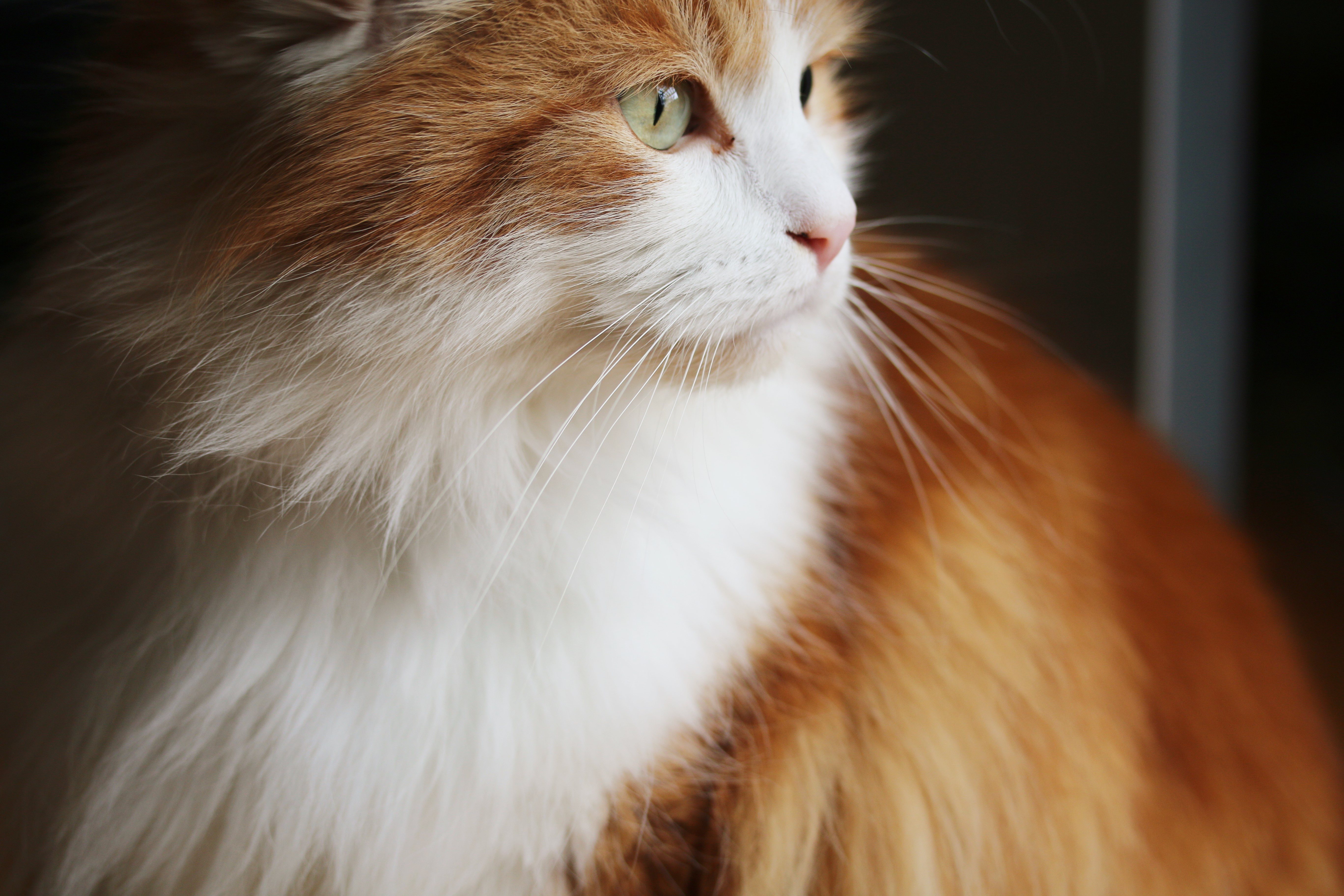 Schnurhaare einer Katze